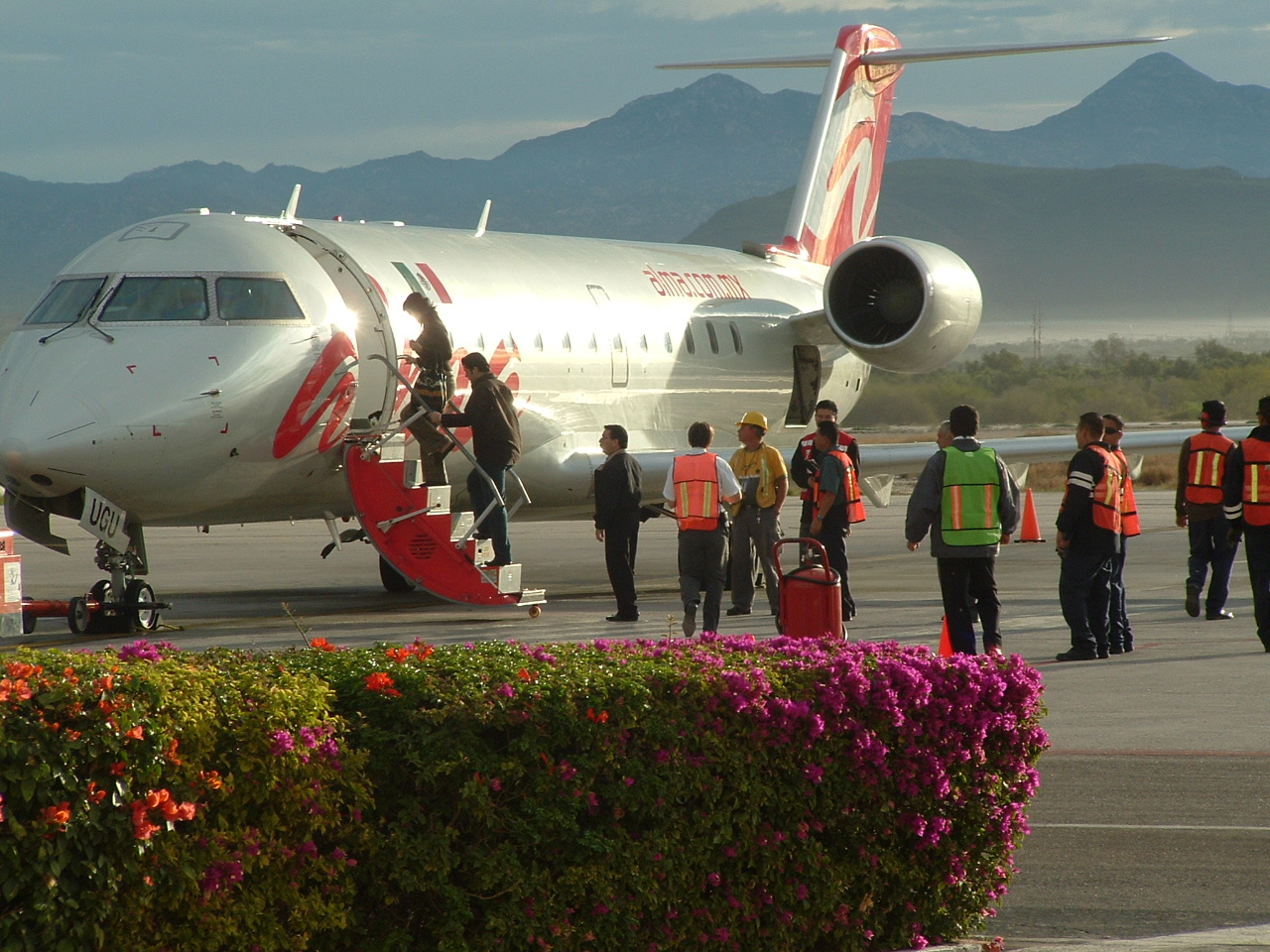 alma de mexico at manuel marquez de leon international airpot, Airline: Alma de Mexico